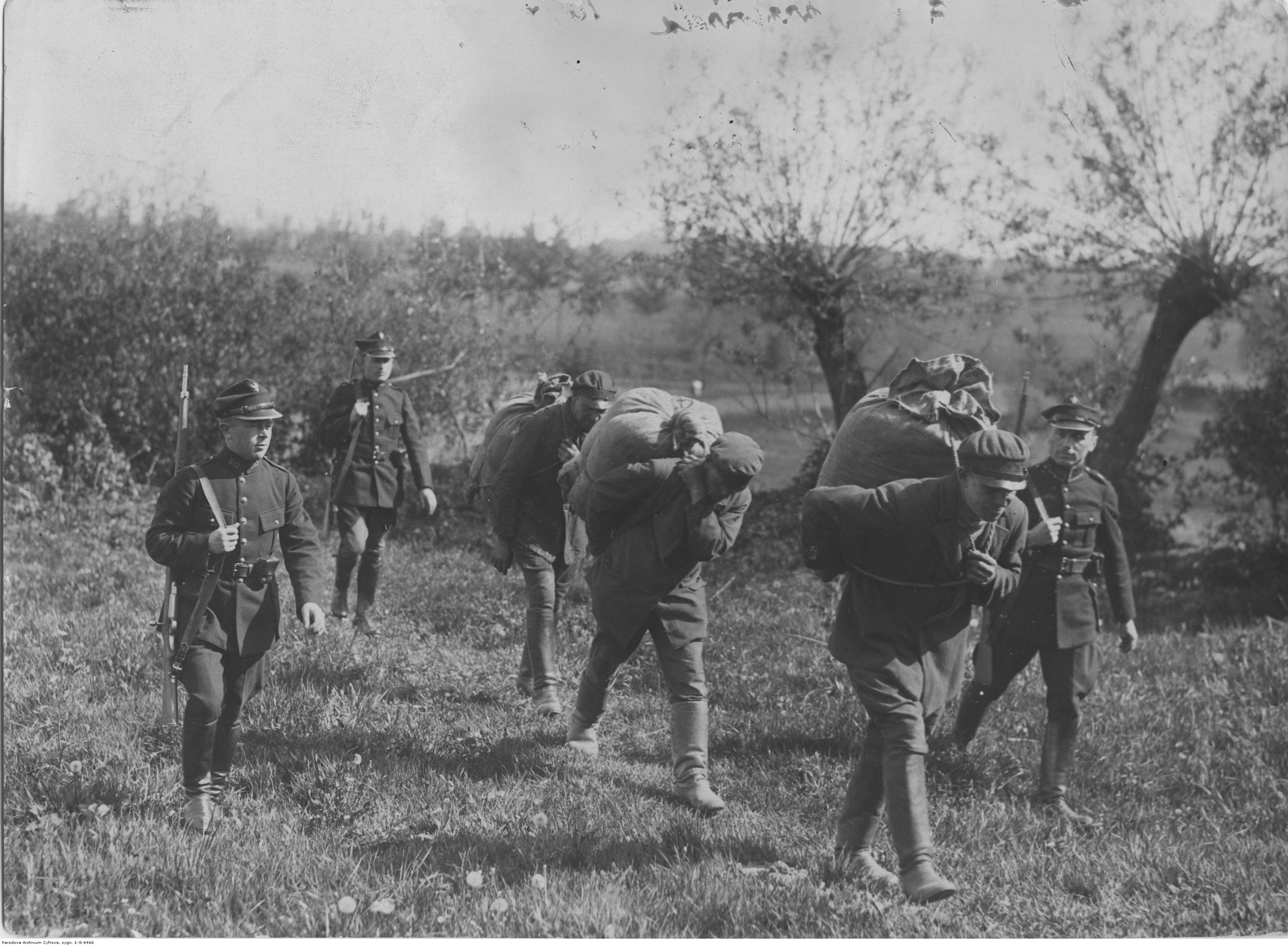 Straż Celna i złapani przemytnicy tytoniu